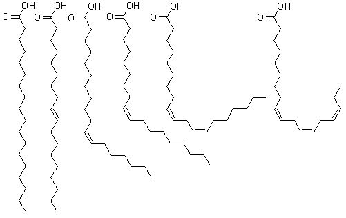 Figur över 6 stycken fettsyror. Ritad med ISIS/Draw och uppladdad av Saccharomyces